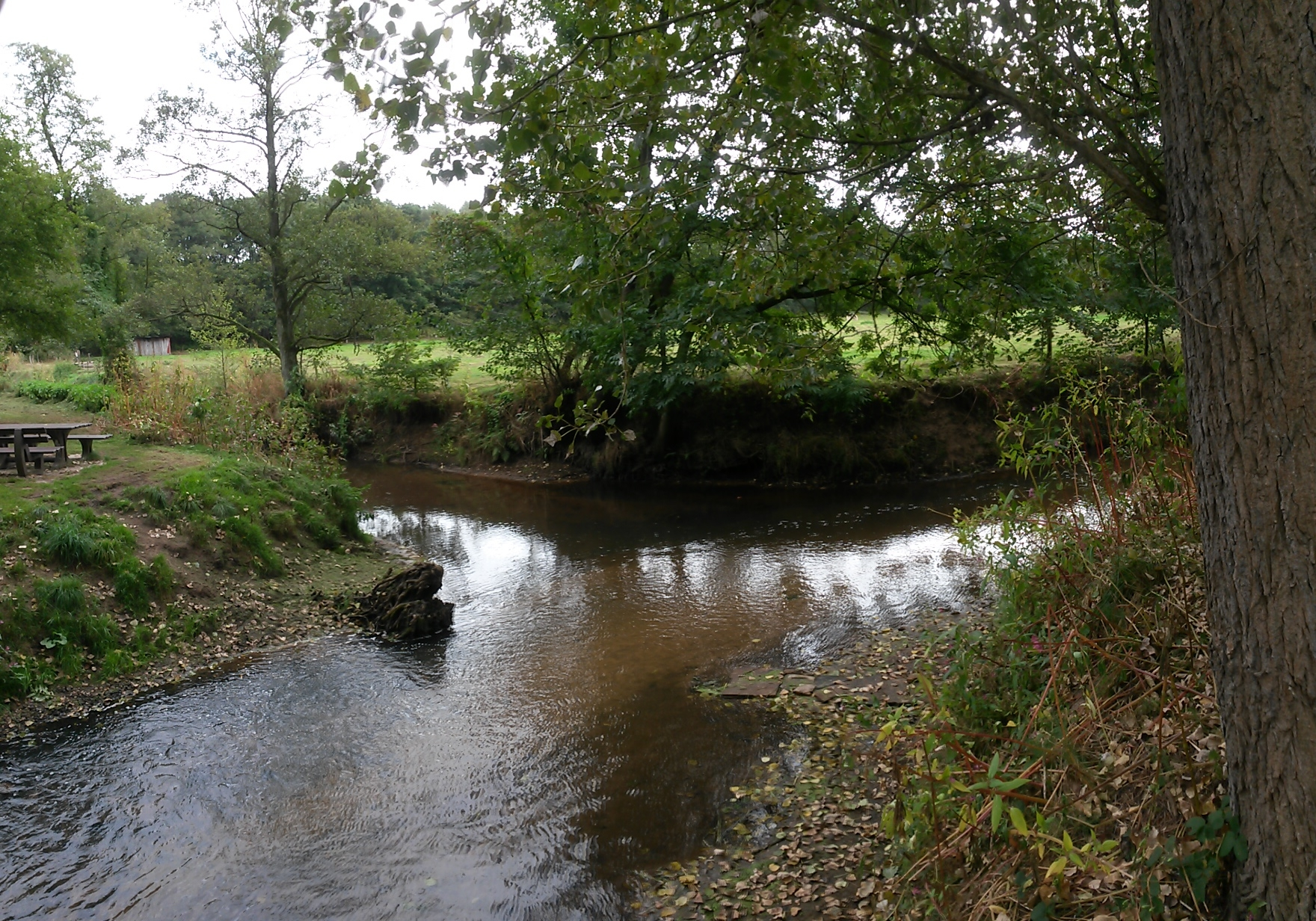 Zusammenfluss Oste und Ramme Nähe Sittensen